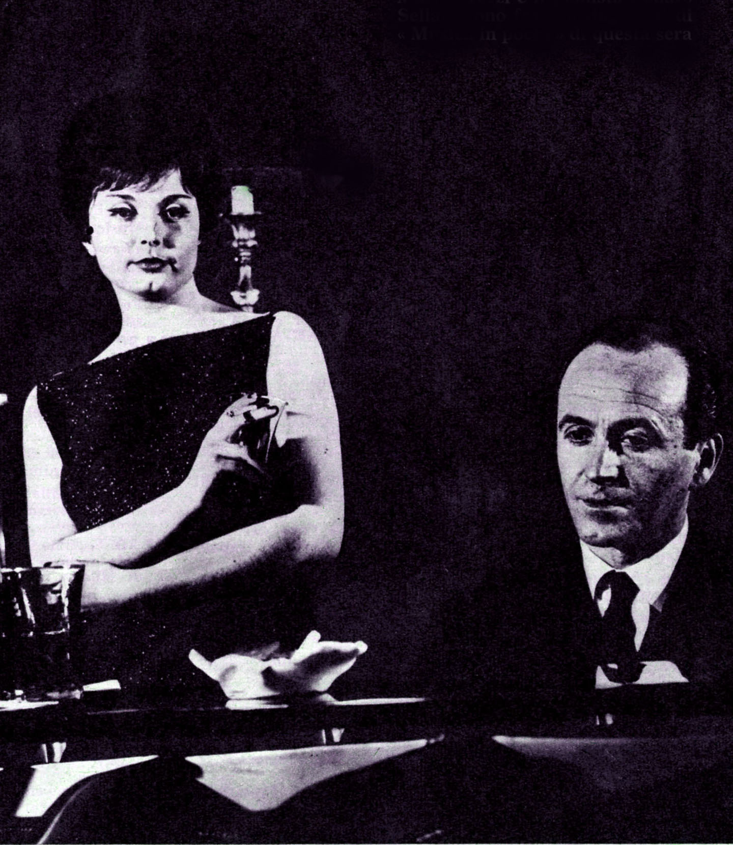 Marisa Terzi and Renato Sellani, photo from the Italian magazine Radiocorriere (1963)